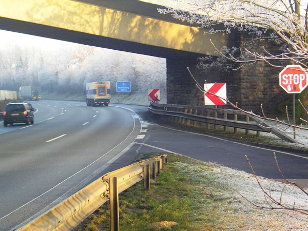 Autobahnparkplatz "Auf der Zeg" an der A48